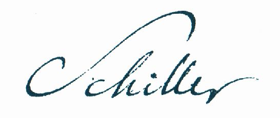 Unterschrift Friedrich Schillers